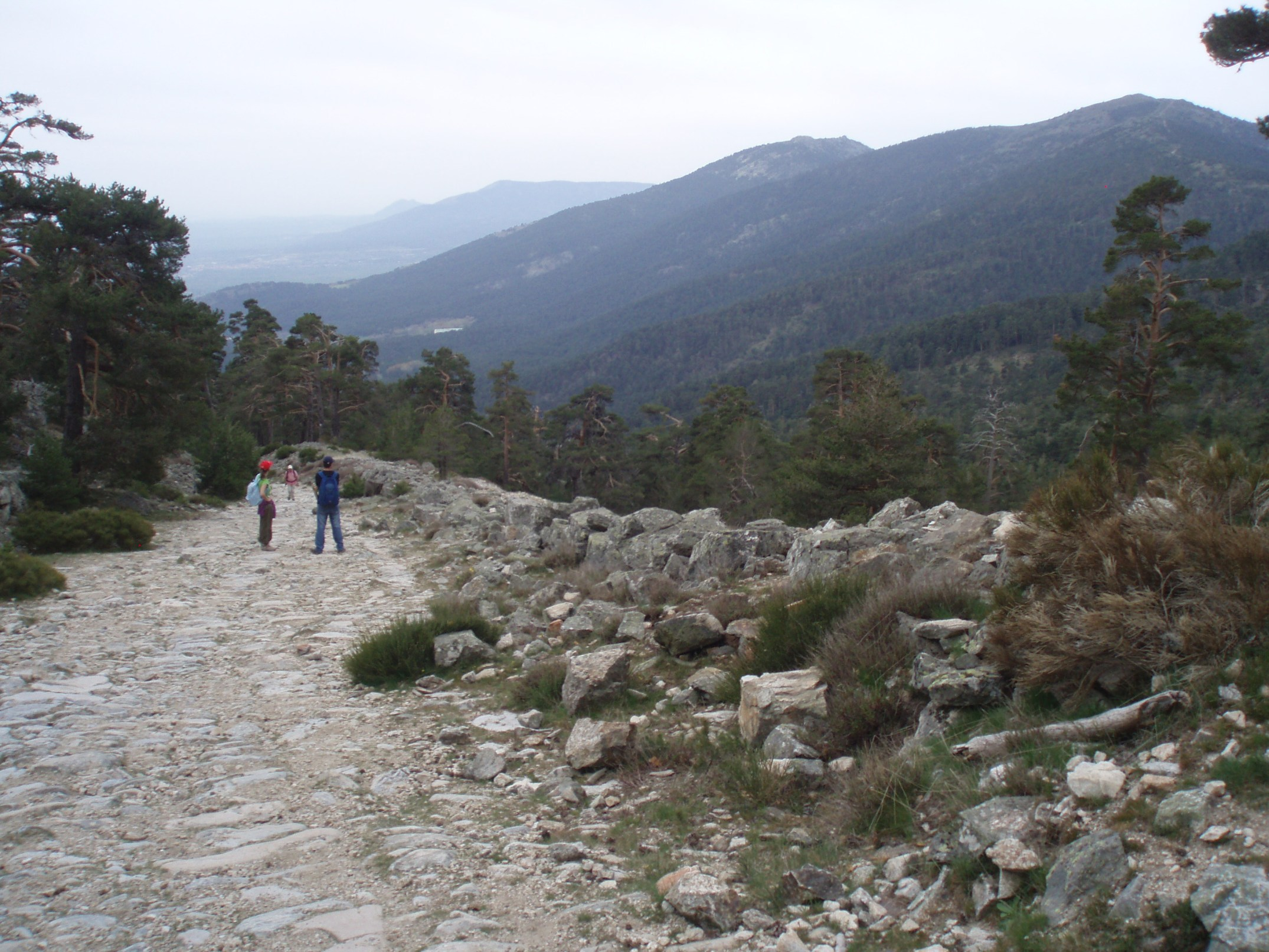 Calzada romana y valle de la Fuenfría (Sierra de Guadarrama, España).